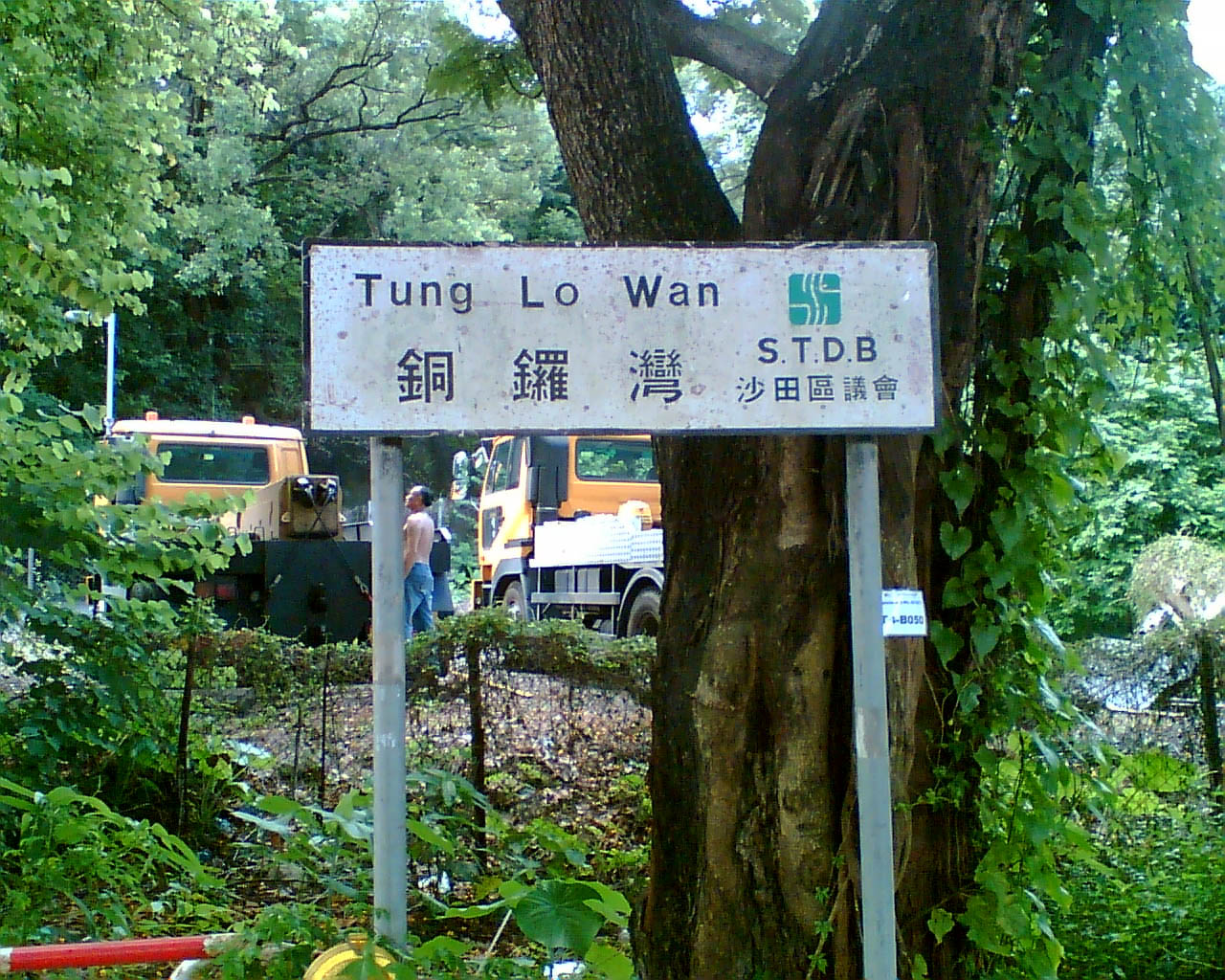 中文（香港）: 沙田銅鑼灣路牌